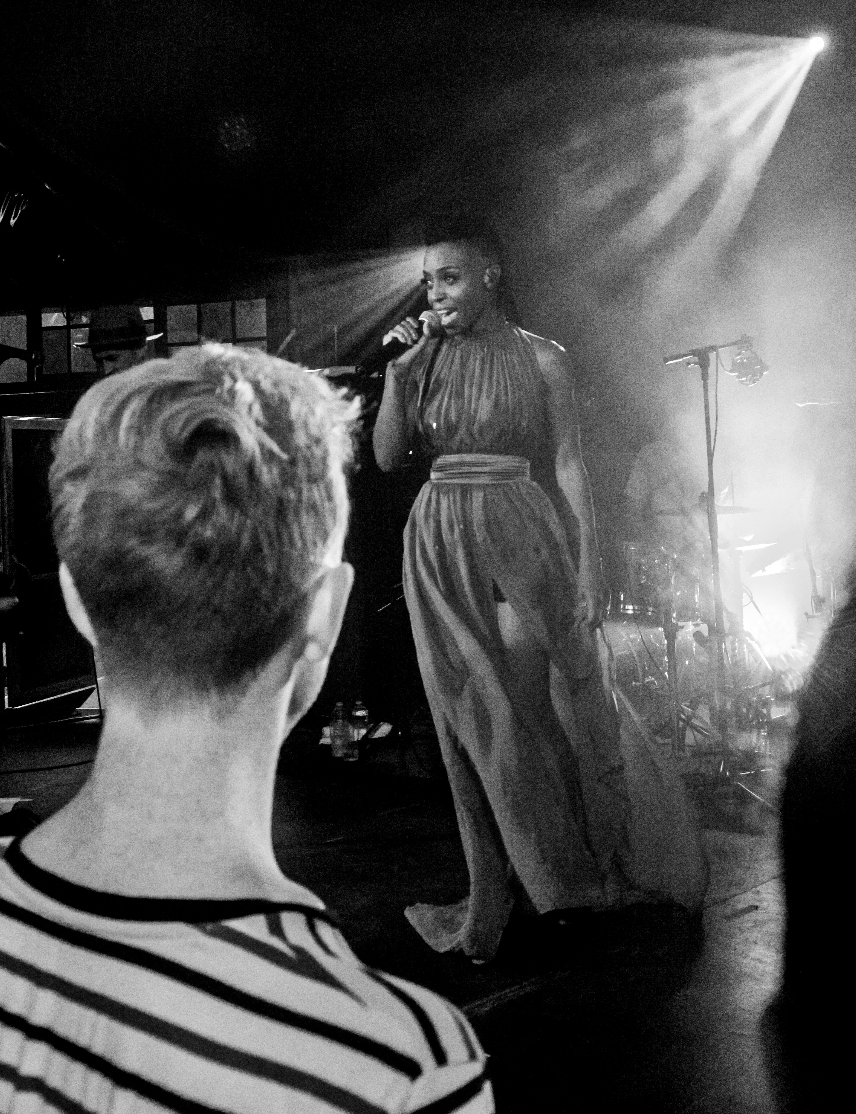 Bilder vom Zelt Musik Festival 2018 in Freiburg im Breisgau Morcheeba Auftritt am 31. Juli 2018 im Speigelzelt